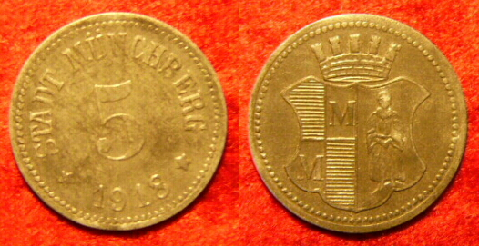 Notgeld aus Münchberg: Fünf Pfennig Münze von 1918